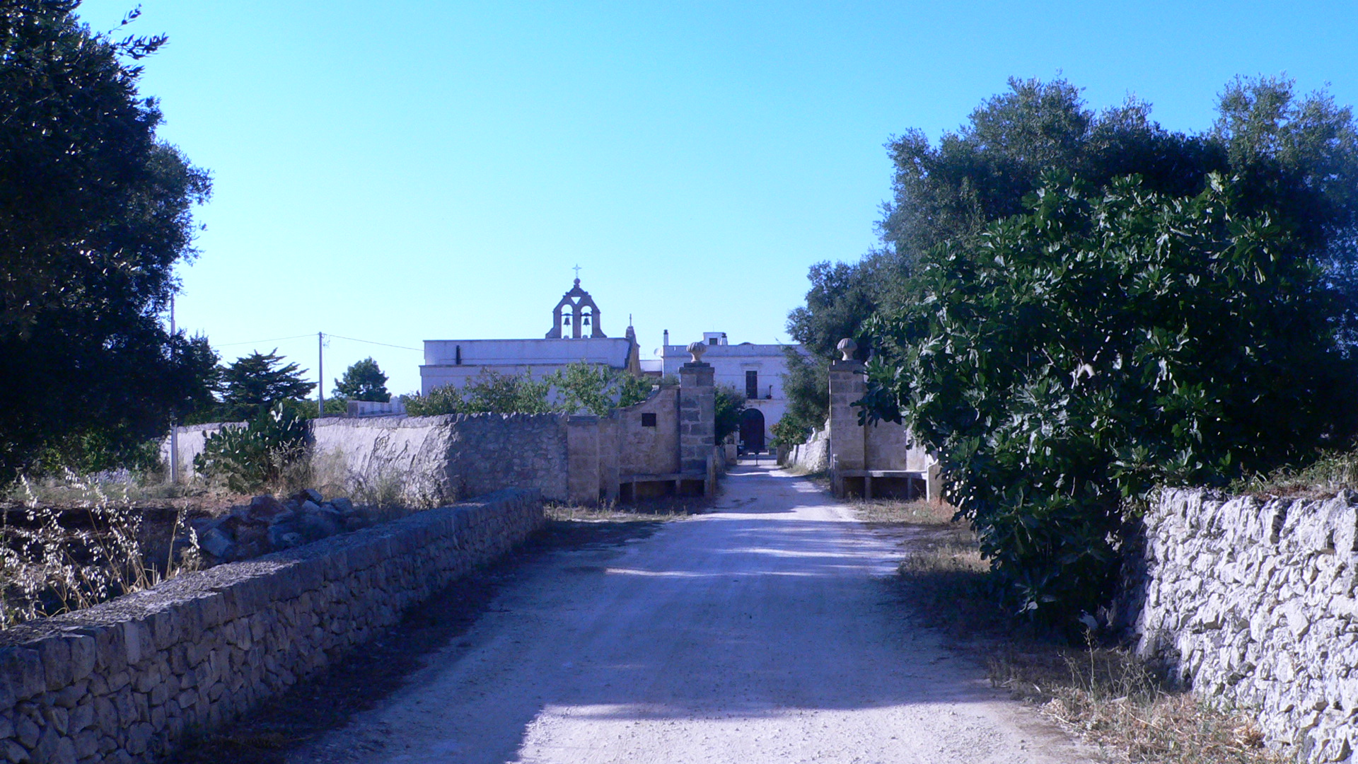 Masseria Galante. Una delle masserie sparse nell'agro di Ceglie Messapica